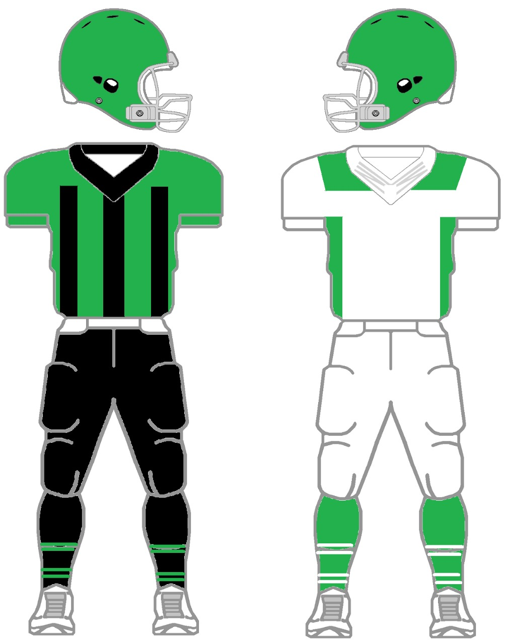 Uniformes 1 e 2 da equipe América Locomotiva